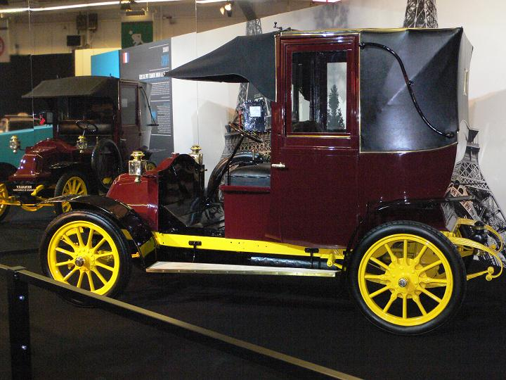 Les Taxis de la Marne, exposé au Mondial de l'automobile de Paris 2008